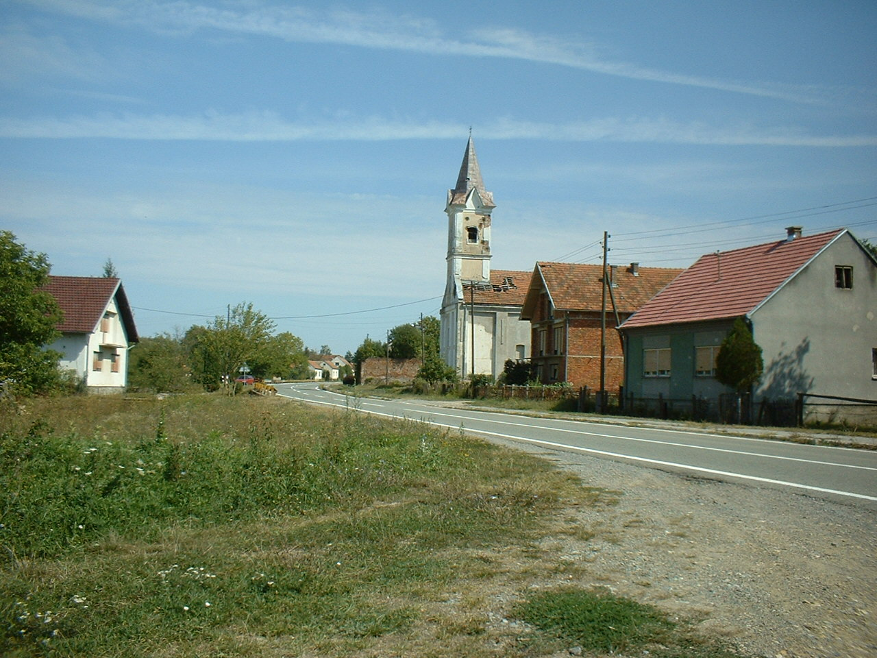 Iglesia Ortodoxa Serbia de Donji Caglic.